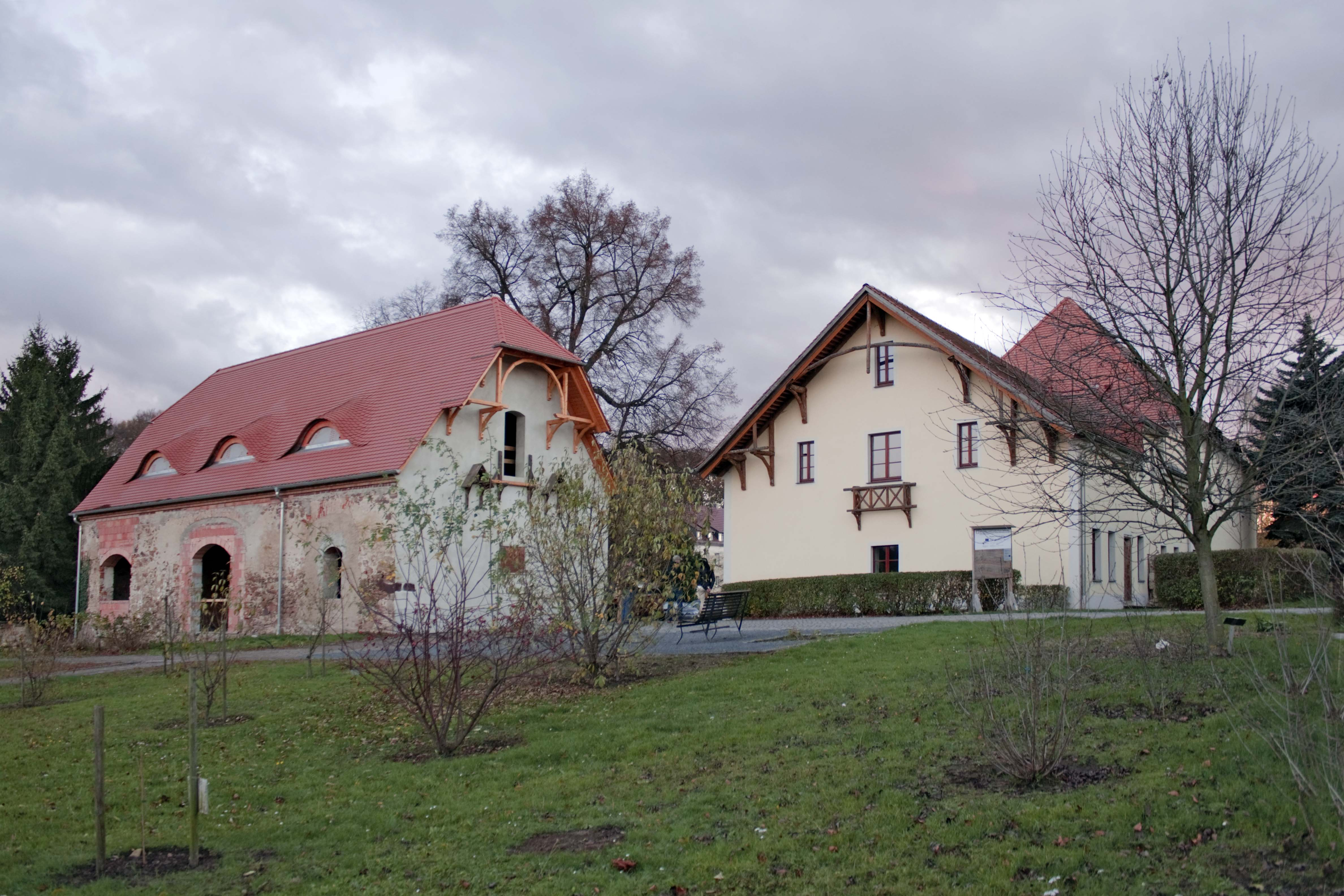 Ehemaliges Zisterzienserinnen-Kloster Marienthal in Sornzig (links Scheune, rechts Schwesternhaus)